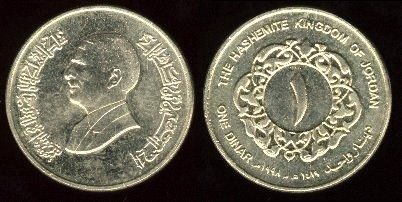 1 Dinar